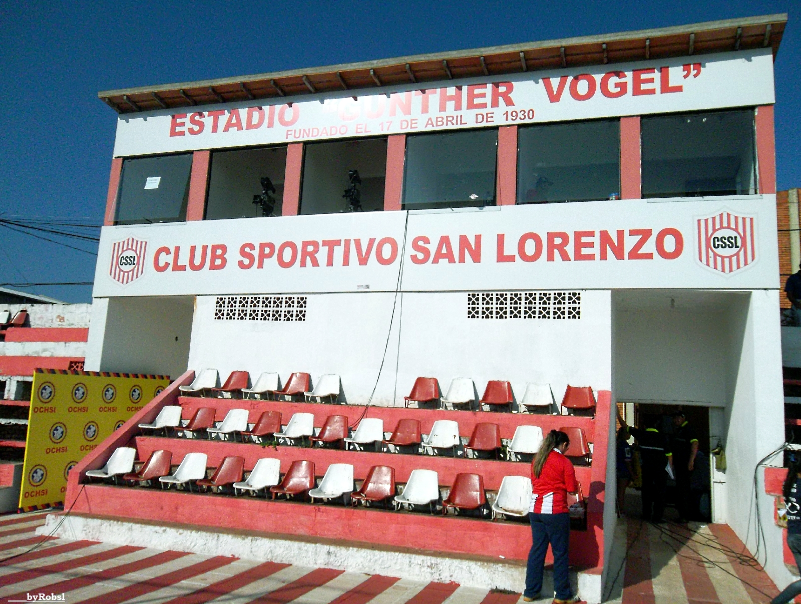 Palco oficial y cabinas de trasmisión del estadio Gunther Vogel de San Lorenzo, Paraguay.